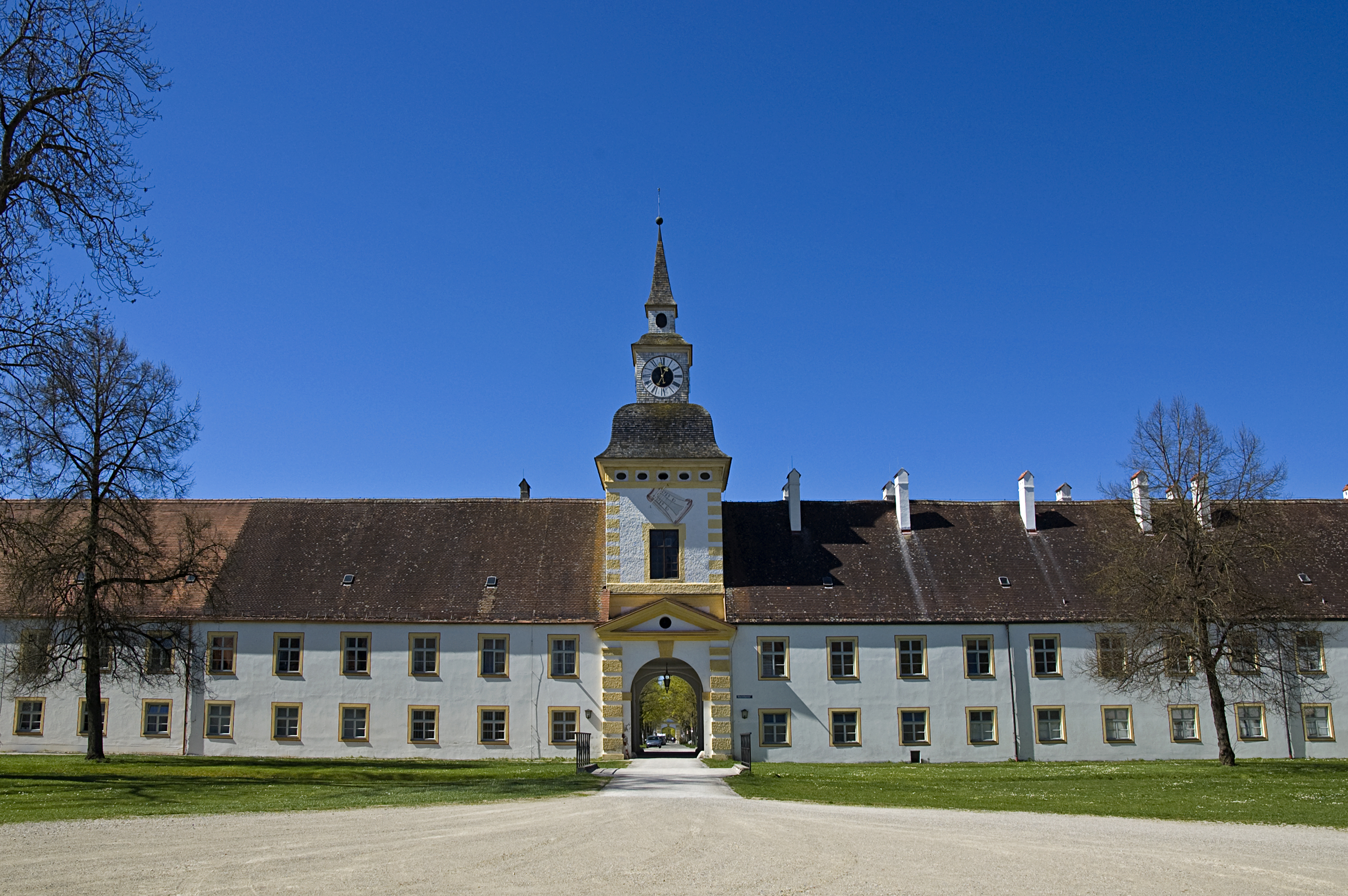 Altes Schloss Schleißheim - Westansicht vom Wilhelmshof